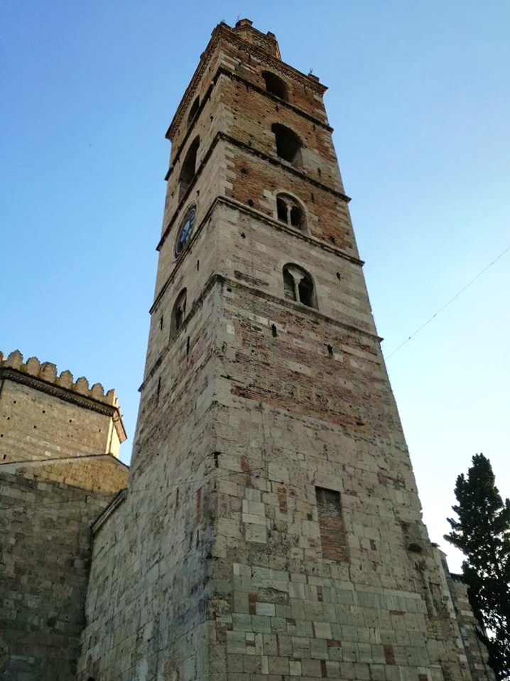 Torre del Duomo di Teramo